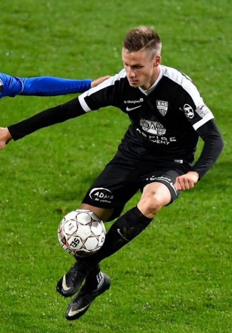 Nils Schouterden (Eupen-Rupel Boom)